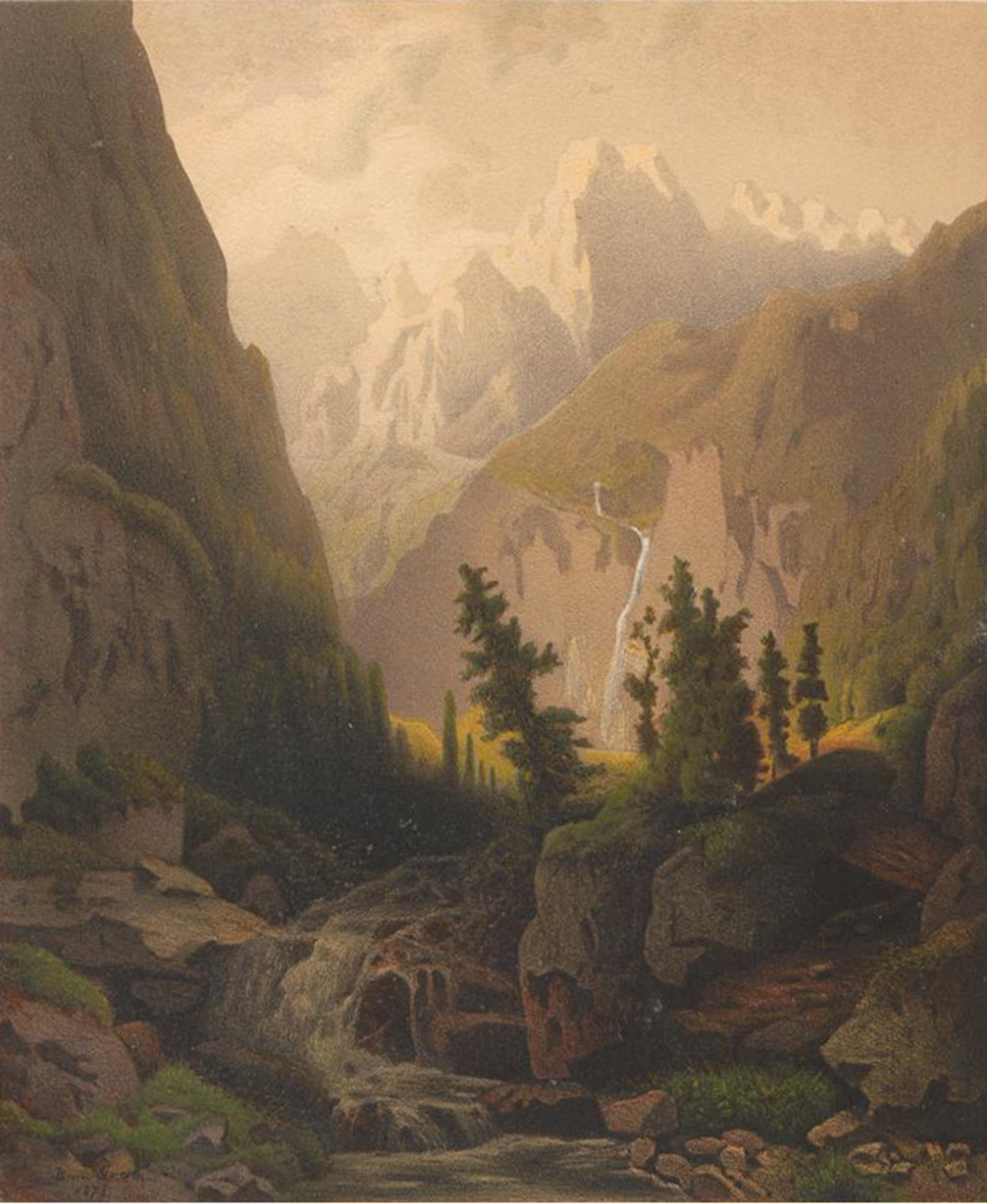 Illustration Gosau-Schlucht (am Wege zum Gosau-See.) gemalt von Bertha von Grab, in Deutsches Künstler-Album, 1874